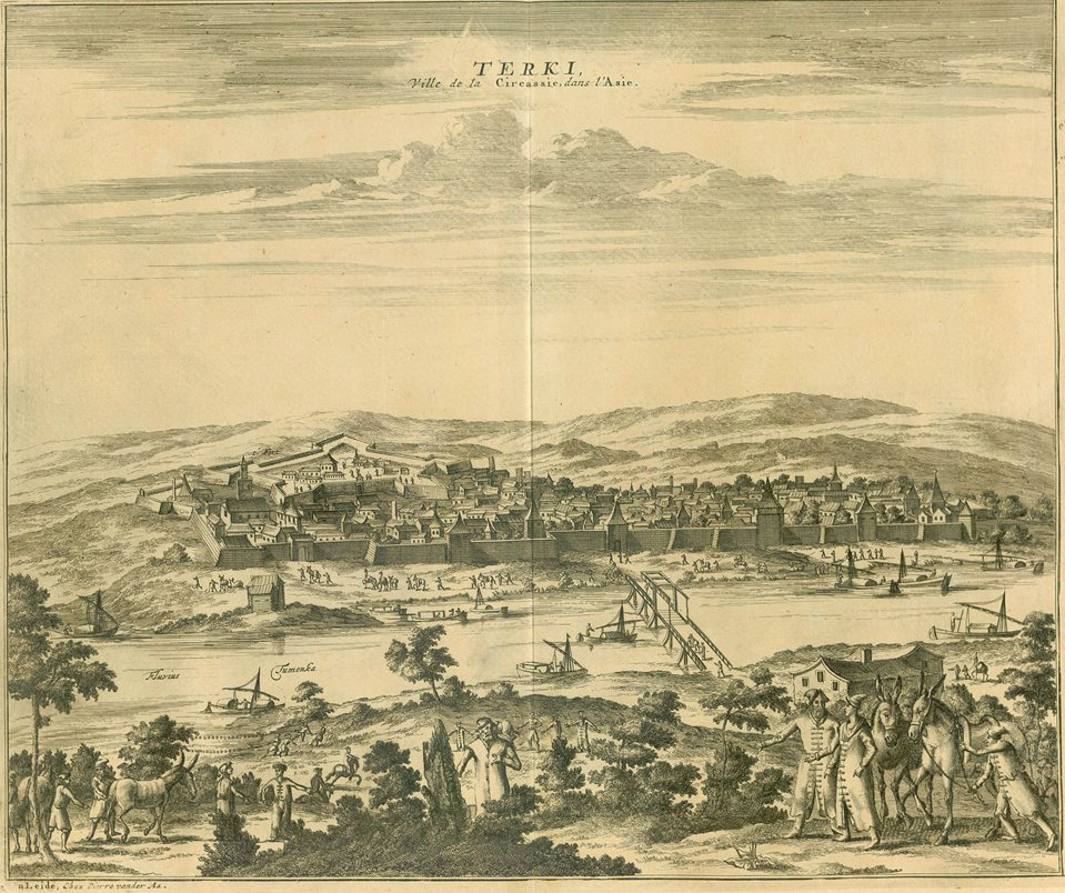 Путешествие по России для исследования трех царств естества. Том 3,ч.1, Гмелин С. страница 423, электронная страница 474